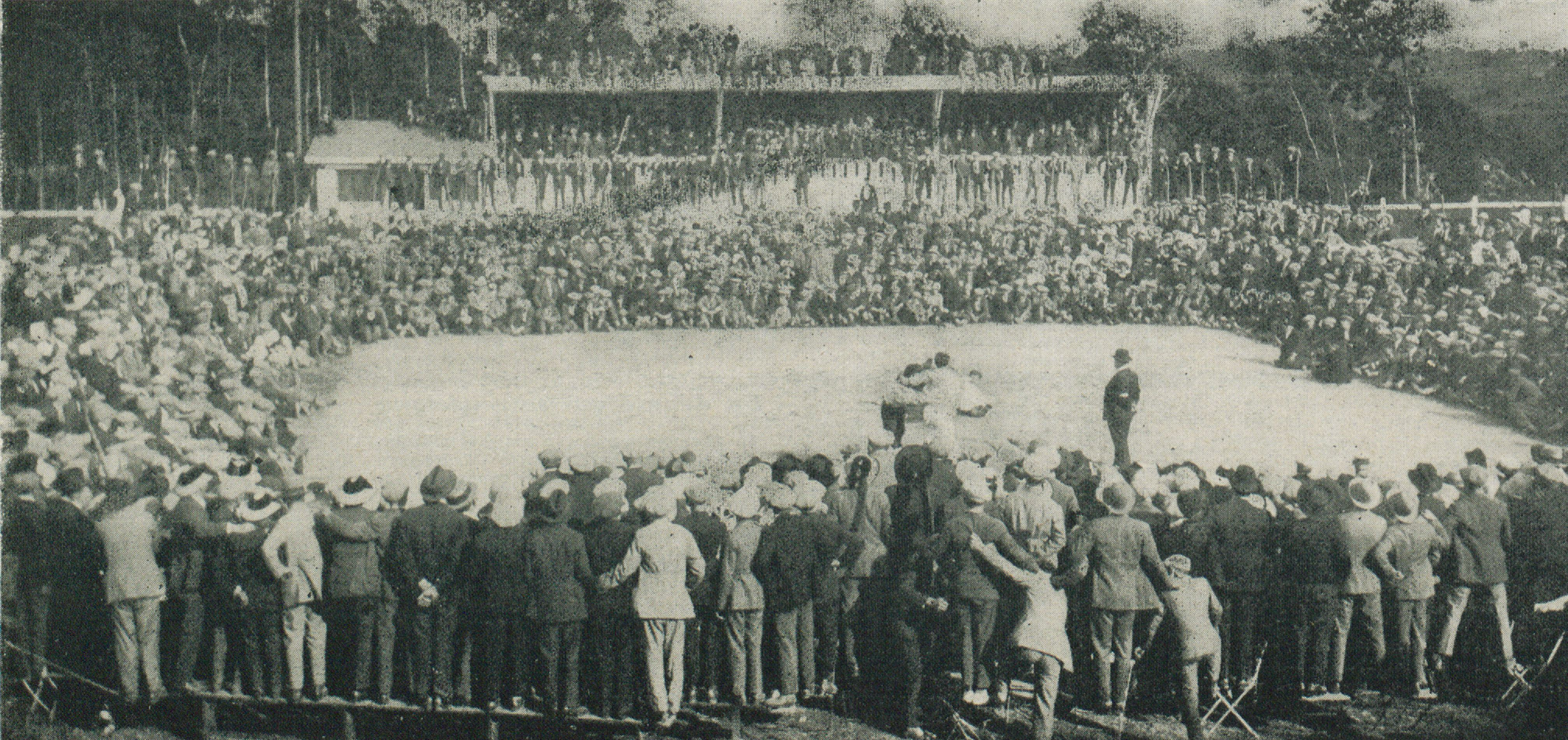 Lutte interceltique de Quimperlé. Combat réunissant 7000 spectateurs.